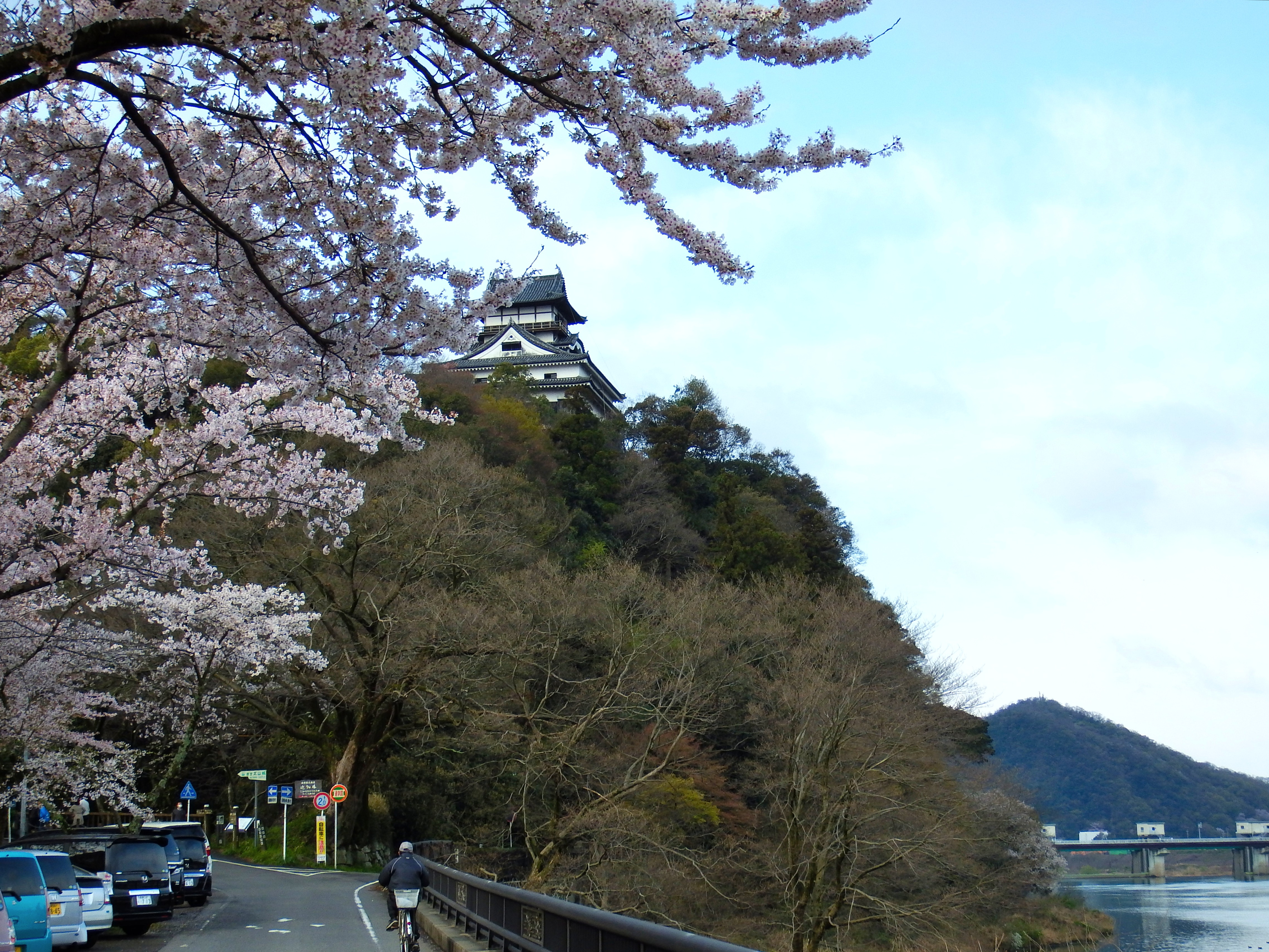 犬山城天守